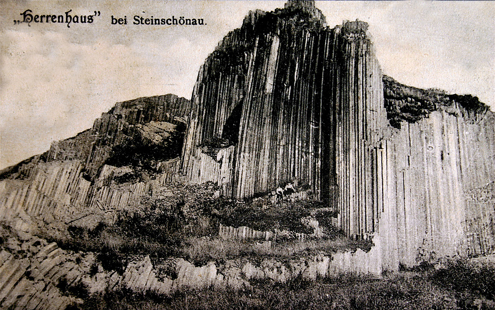 Kamenický Šenov, (Steinschönau), Panská Skála (Herrenhausfelsen), basalt formation. Old Postcard, approx. 1920.